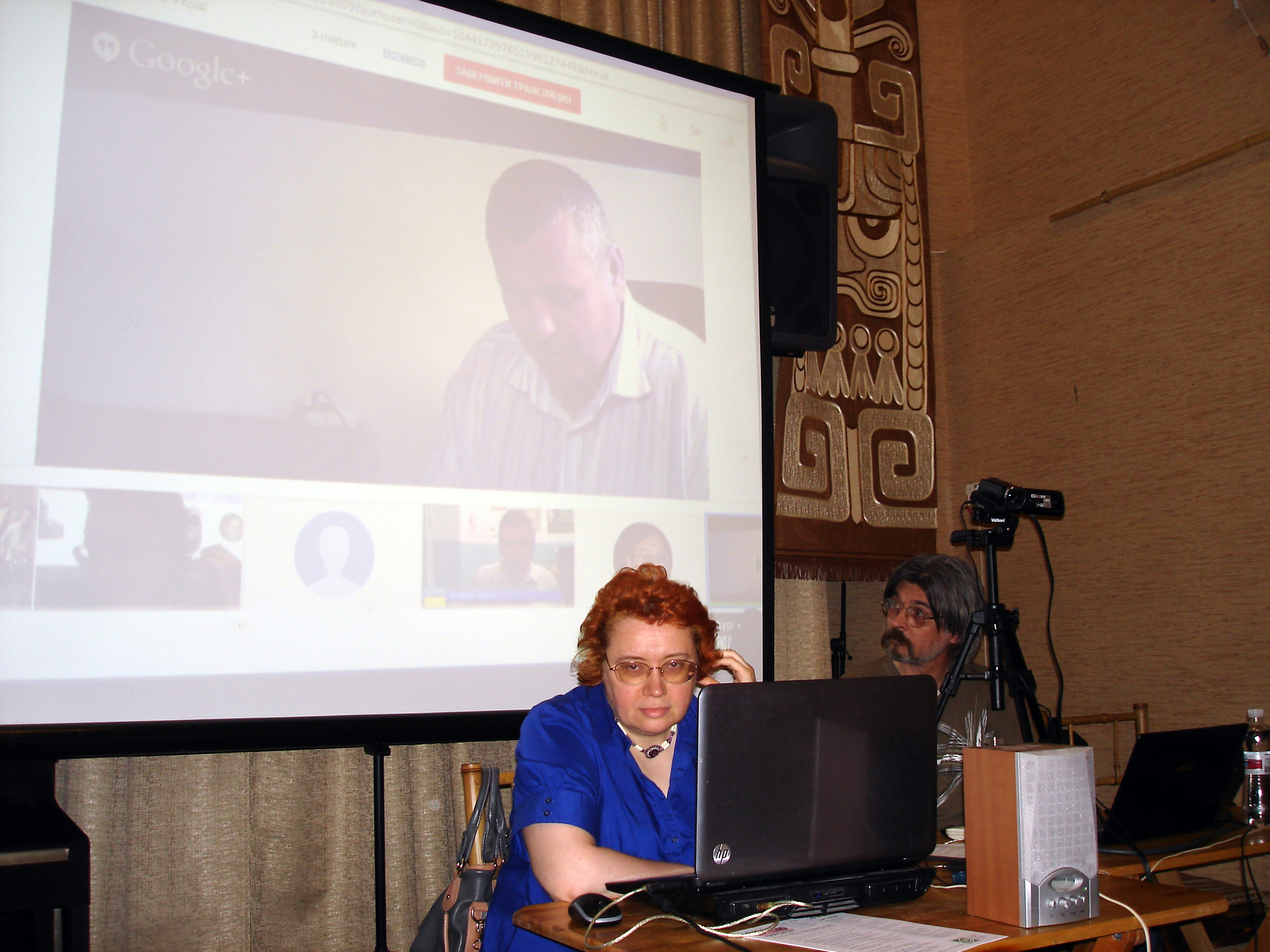 Відкрита дискусія "Maidan Reload №16" «Економічна свобода в Україні». Модератори дискусії Наталія Зубар та Віктор Гарбар. Харків, 11.06.2013.